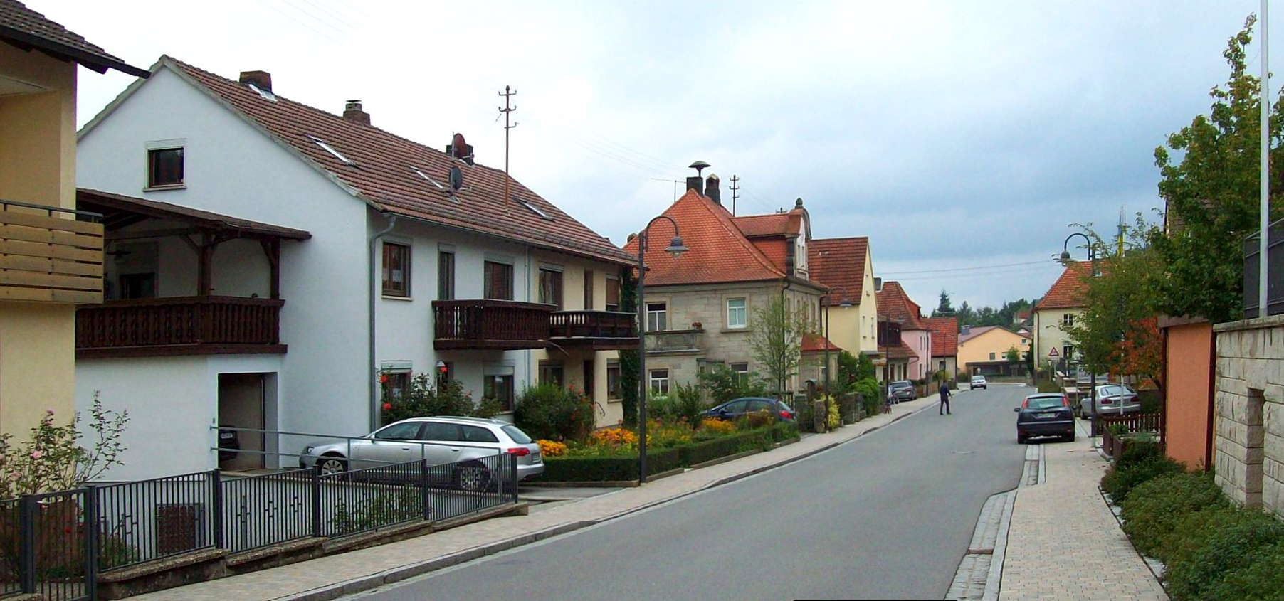 Trossenfurt (Steigerwald) Ortsdurchfahrt, Staatsstraße 2276